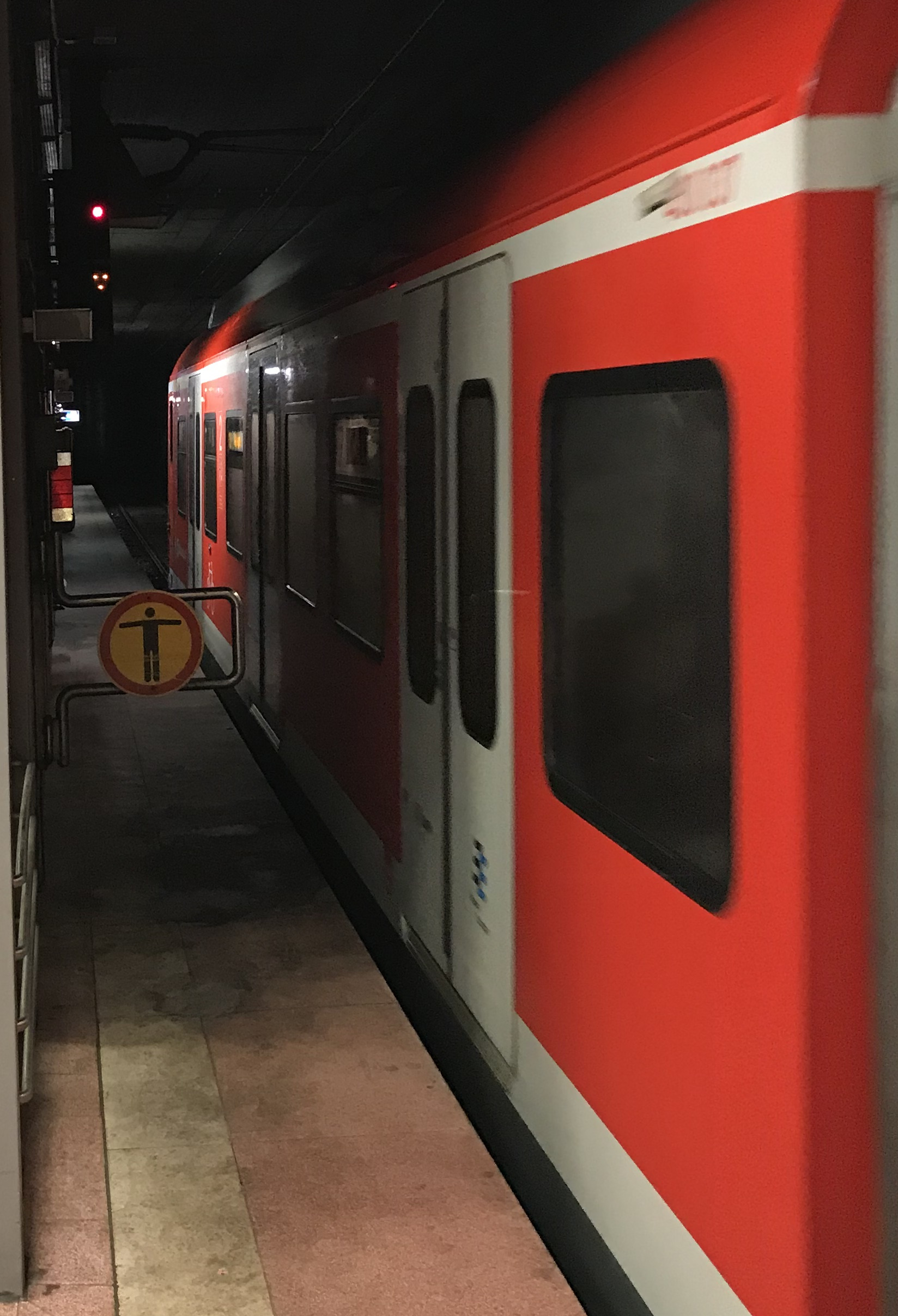 Vorsichtsignal in Stuttgart Hbf (tief). Das Vorsichtsignal leuchtete während einer Störung. Es zählt nicht zu den automatisch angesteuerten Vorsichtsignalen, die ebenfalls auf der Strecke zu finden sind.